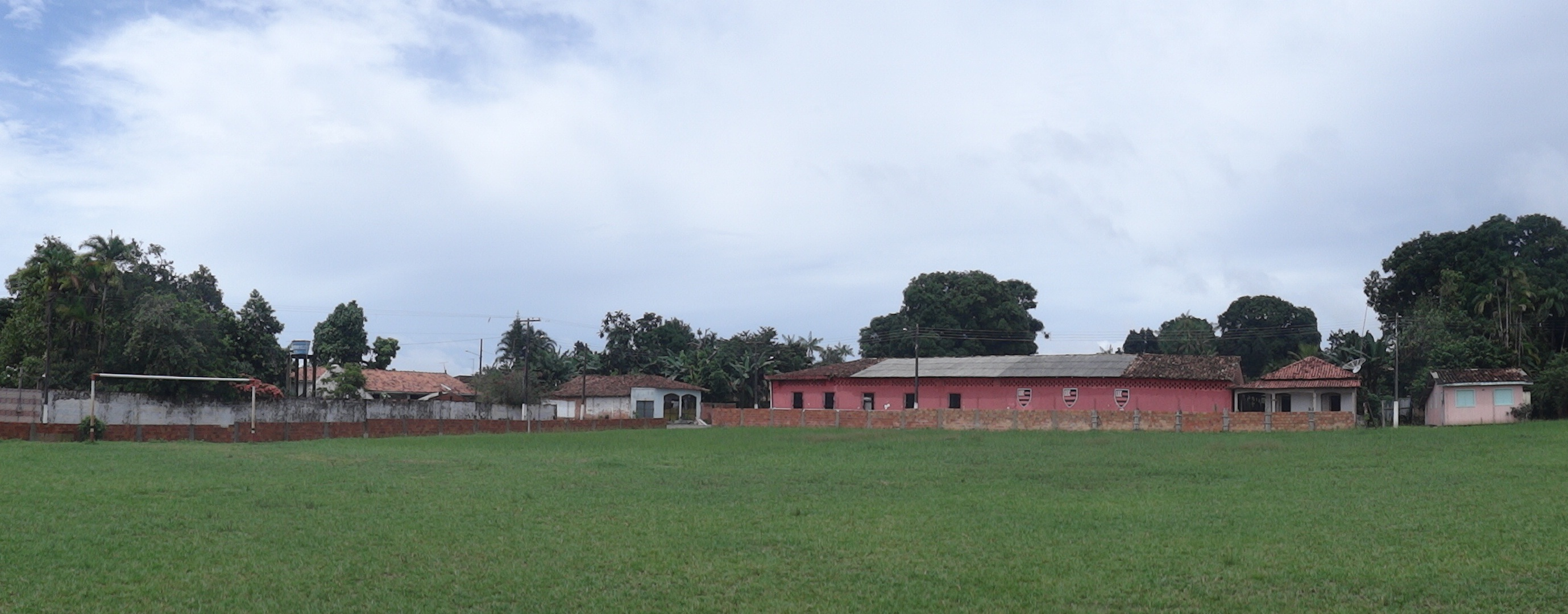 Colares - Campo do Luzío - Local de observação registro 28, 06 de novembro de 1977 05h25min - Equipe da 2a Seção - Registros de Observações de OVNI - I COMAR.